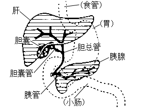 消化系统图，显示胆管位置。